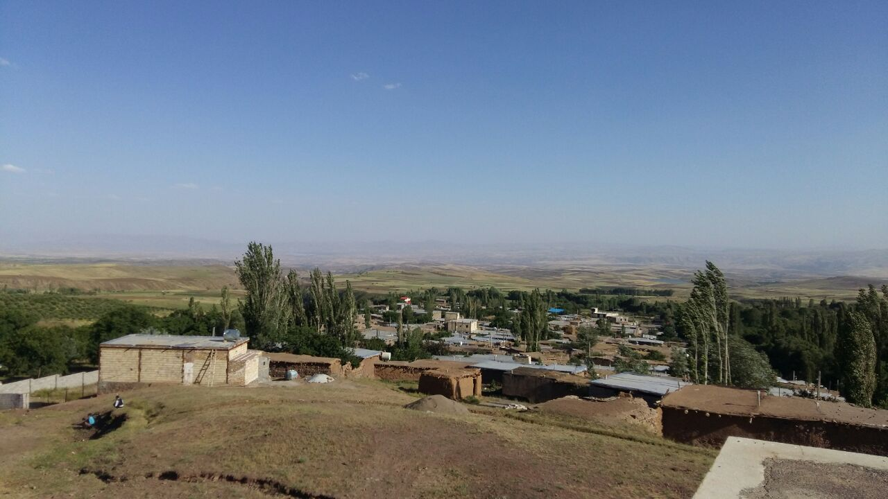 نمای کلی روستای حلمسی در آخرین روزهای تابستان